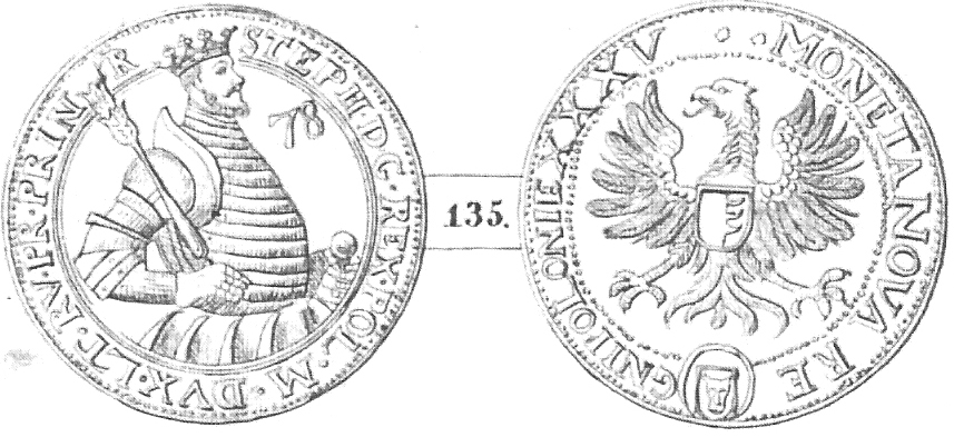 Talar_Batory__(15)78.